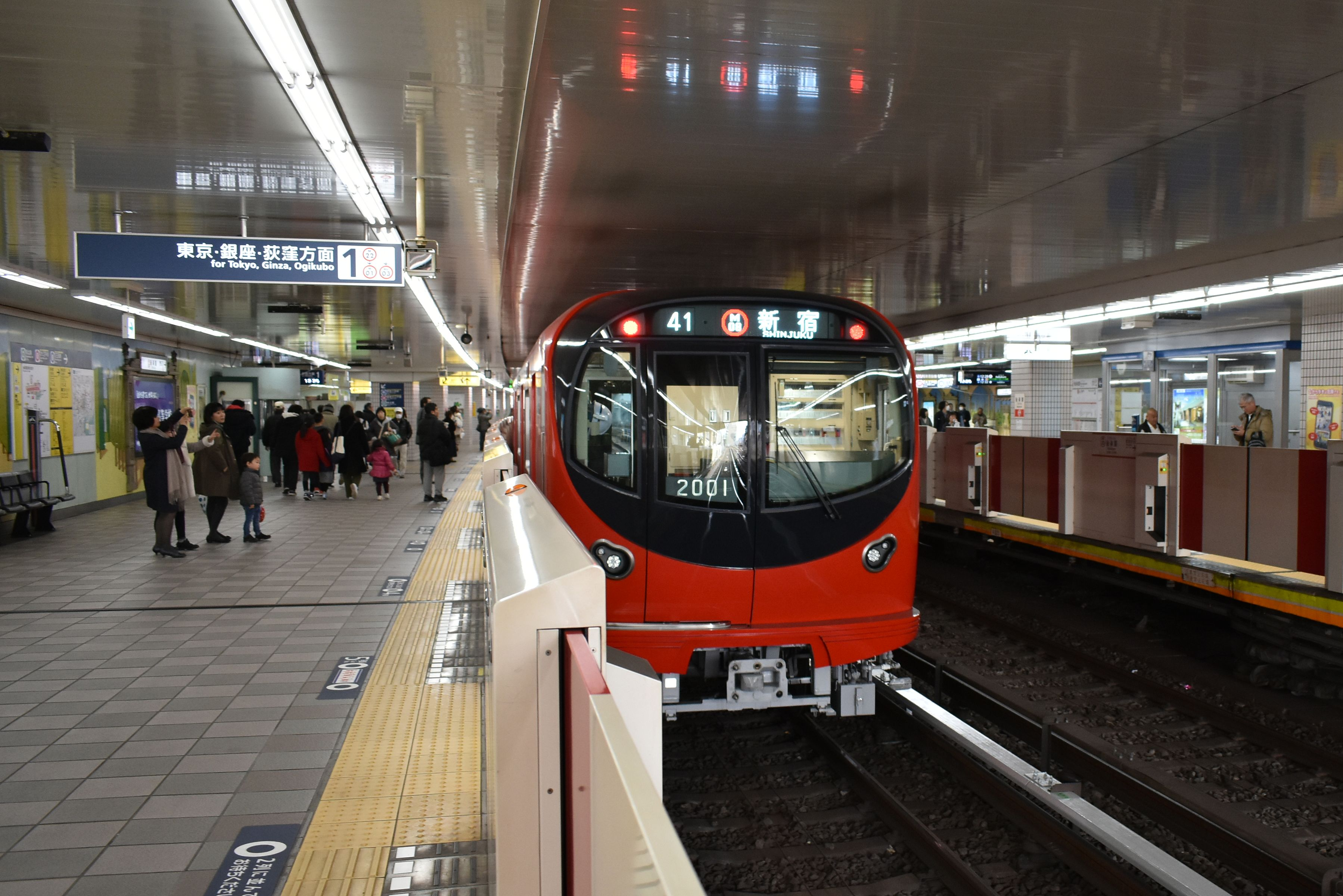 東京メトロ丸の内線 2000系車両。後楽園駅にて。 Nikon D3400